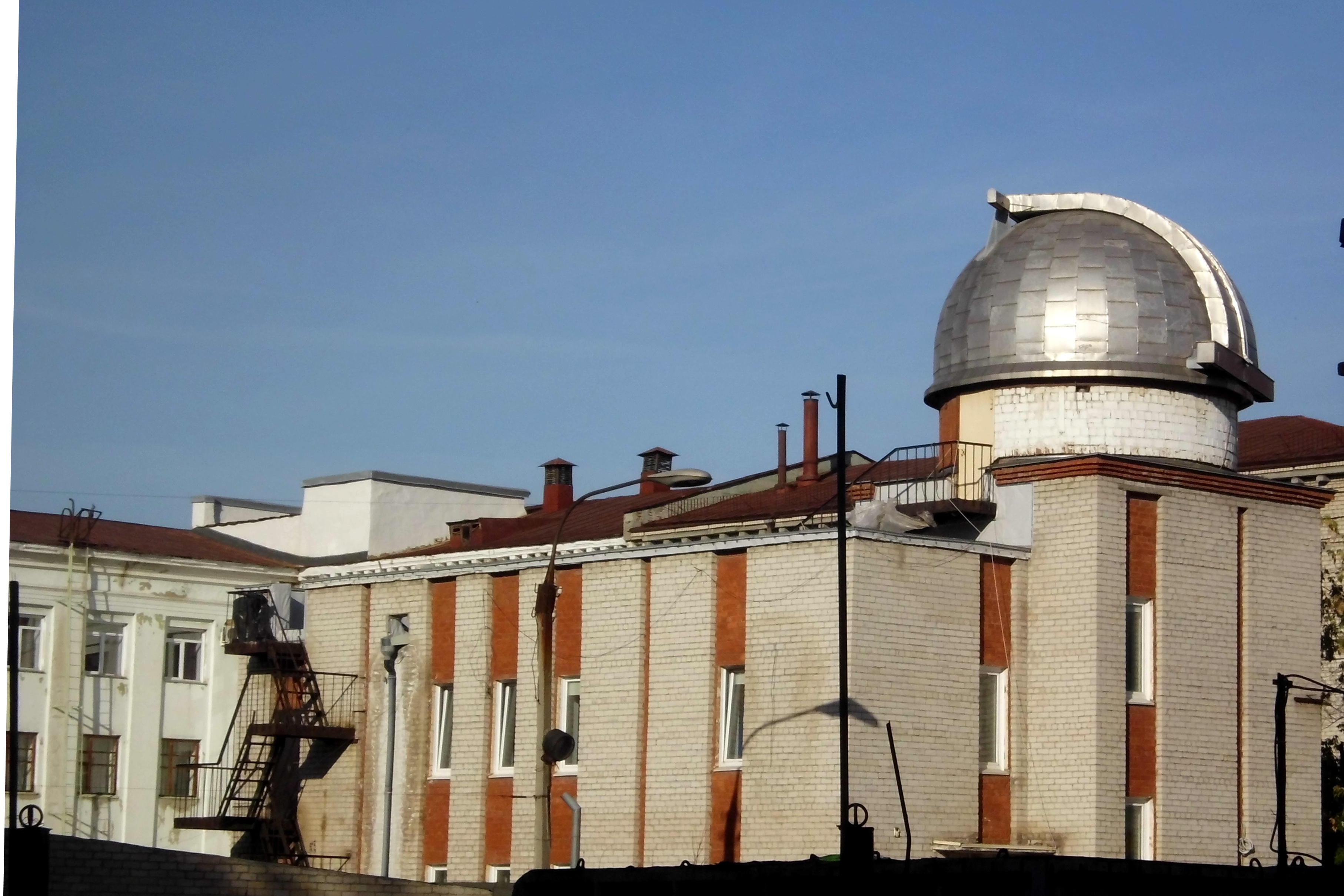 Здание, где в 1941 г. выступал писатель Серафимович А. и работал писатель-краевед Бирюков В. П.: проспект Ленина, 69 (передняя центральная и правая части комплекса зданий основного учебного корпуса педагогического университета), Челябинск, Челябинская область. Обсерватория университета в здании во внутреннем дворе. Слева - часть внутреннего (южного) фасада центральной передней части главного корпуса университета (пр-т Ленина, 69). Вид в северо-восточном направлении.